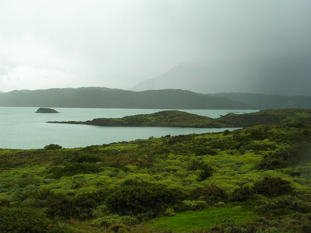 Matorral, pris sur le lac Nordenskjold, parc Torres del Paine, Chili